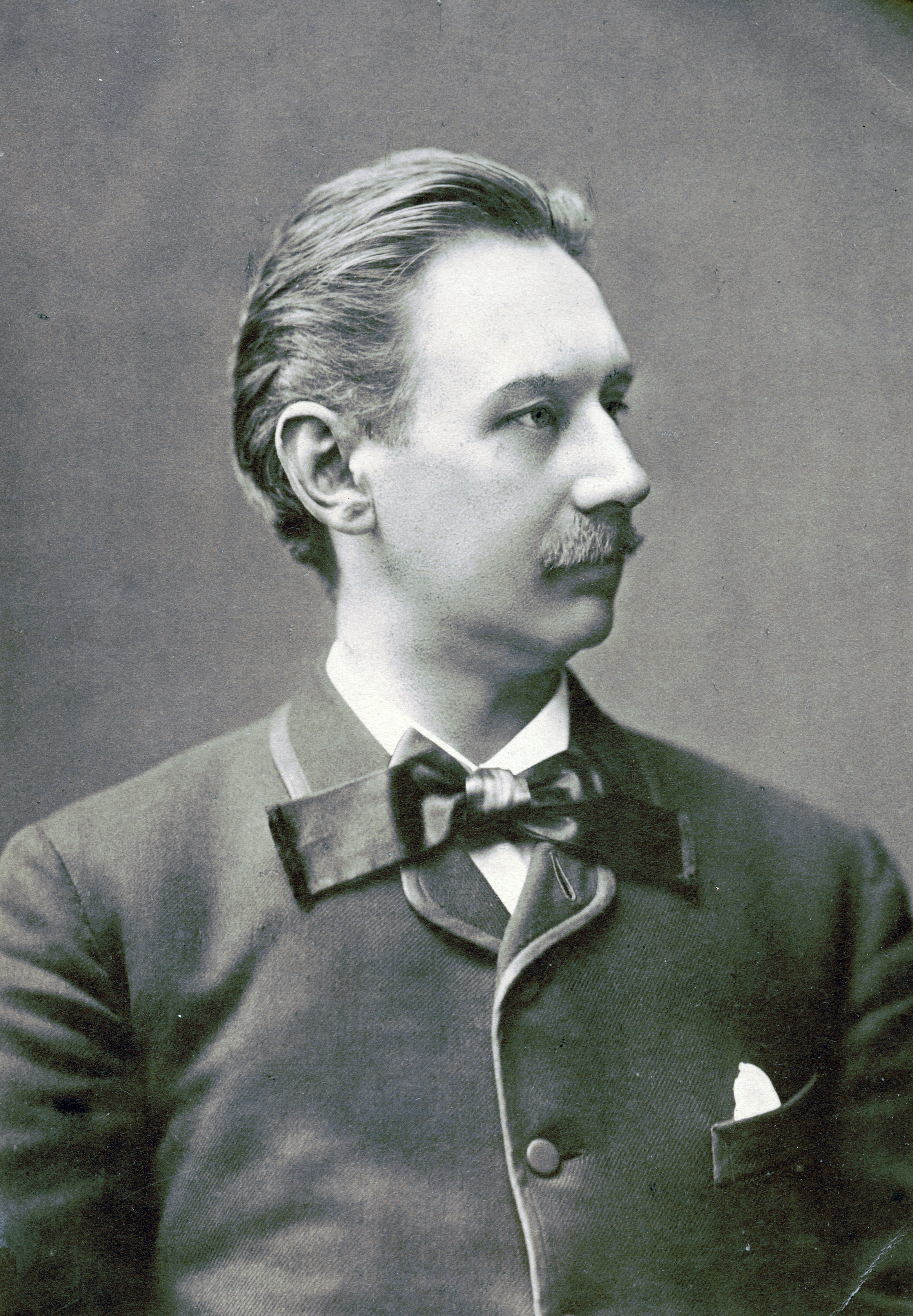 Adolf Hellander, skådespelare vid Nya teatern 1878